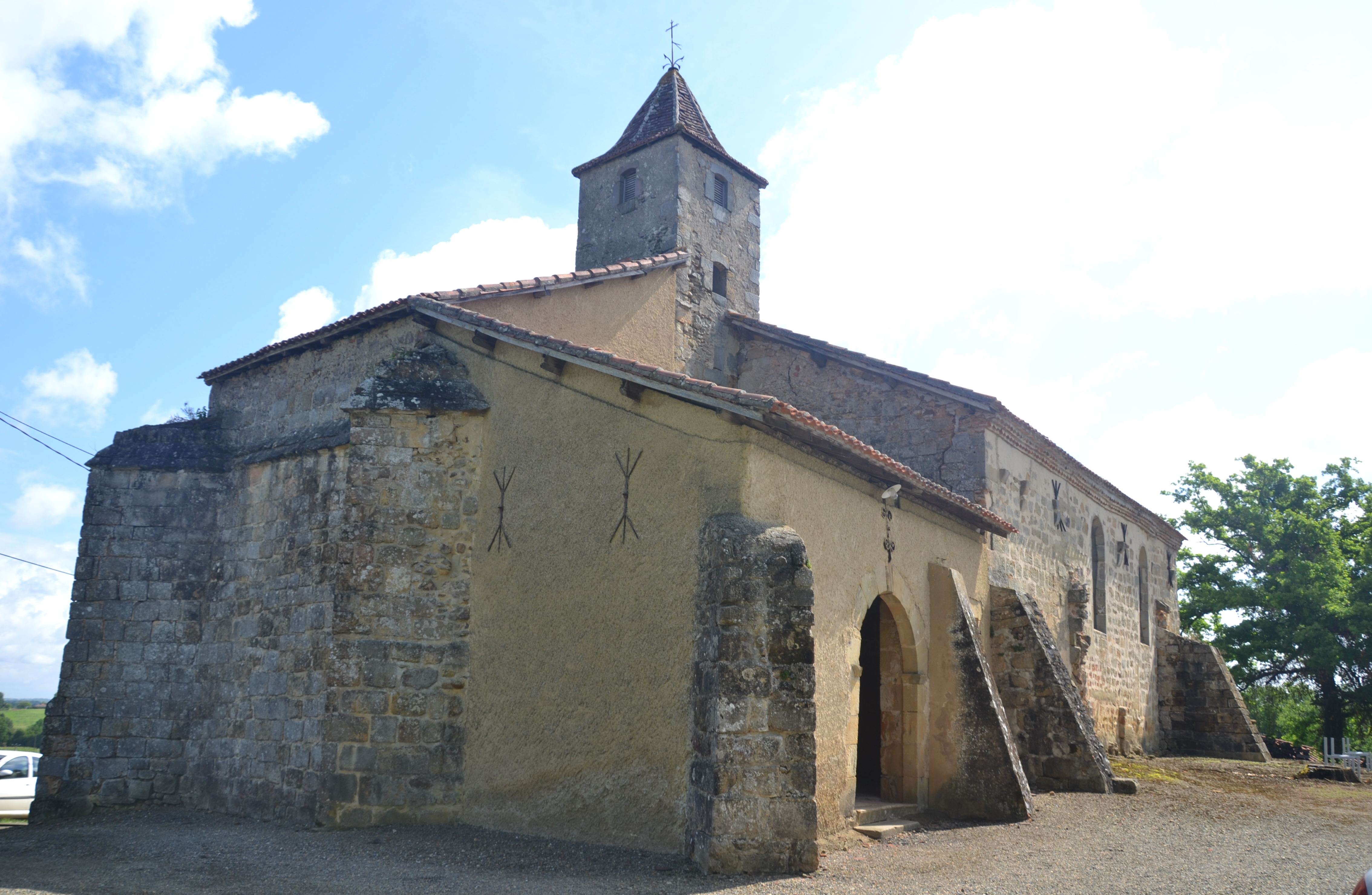 façade de l'église de Maulichères